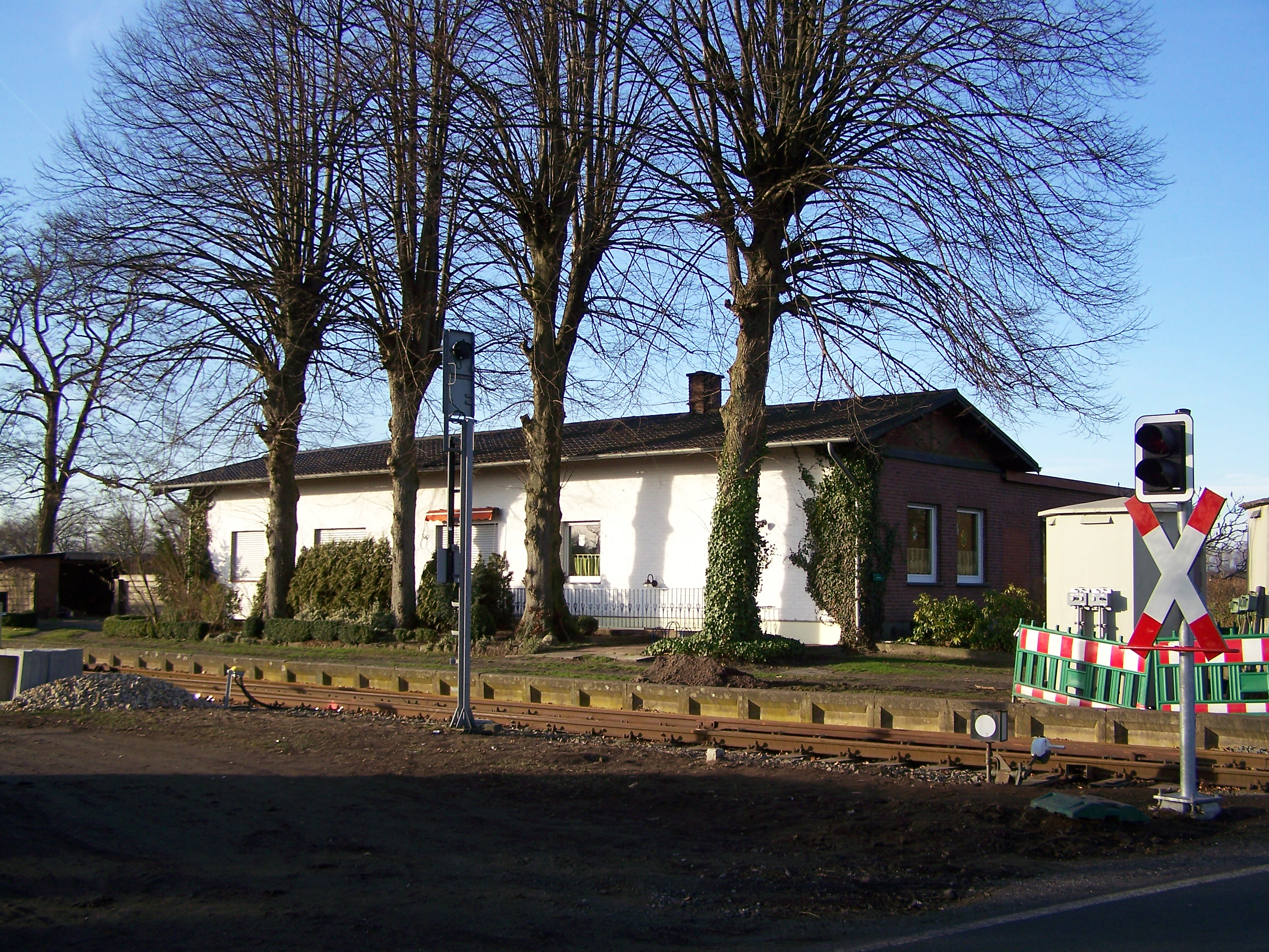 Bahnhof Ostenwalde, Kreis Steinfurt, Nordrhein-Westfalen, Deutschland